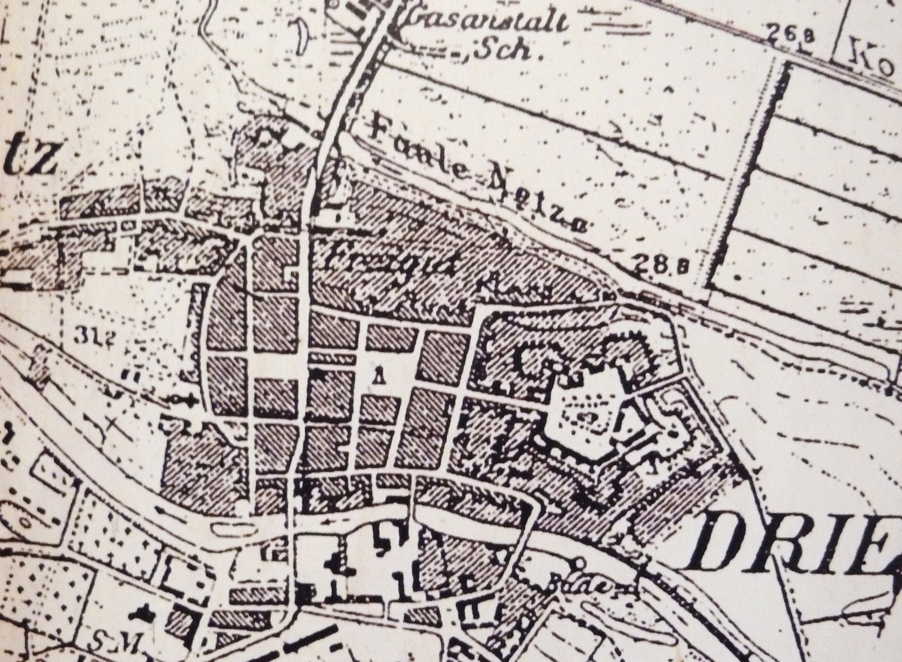 XVIII-wieczna mapa Drezdenka i okolic.